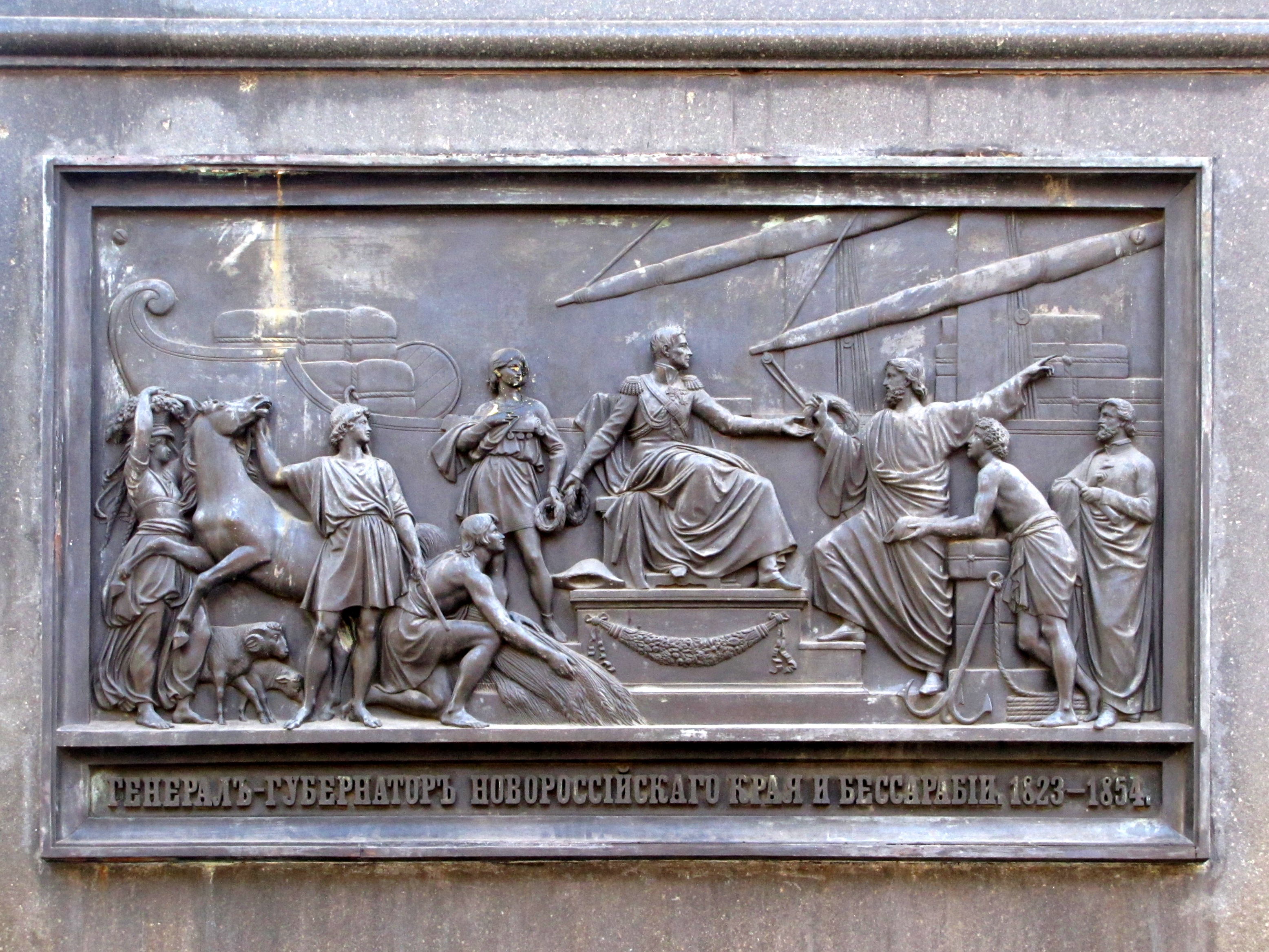 Pomník Voroncova v Oděse